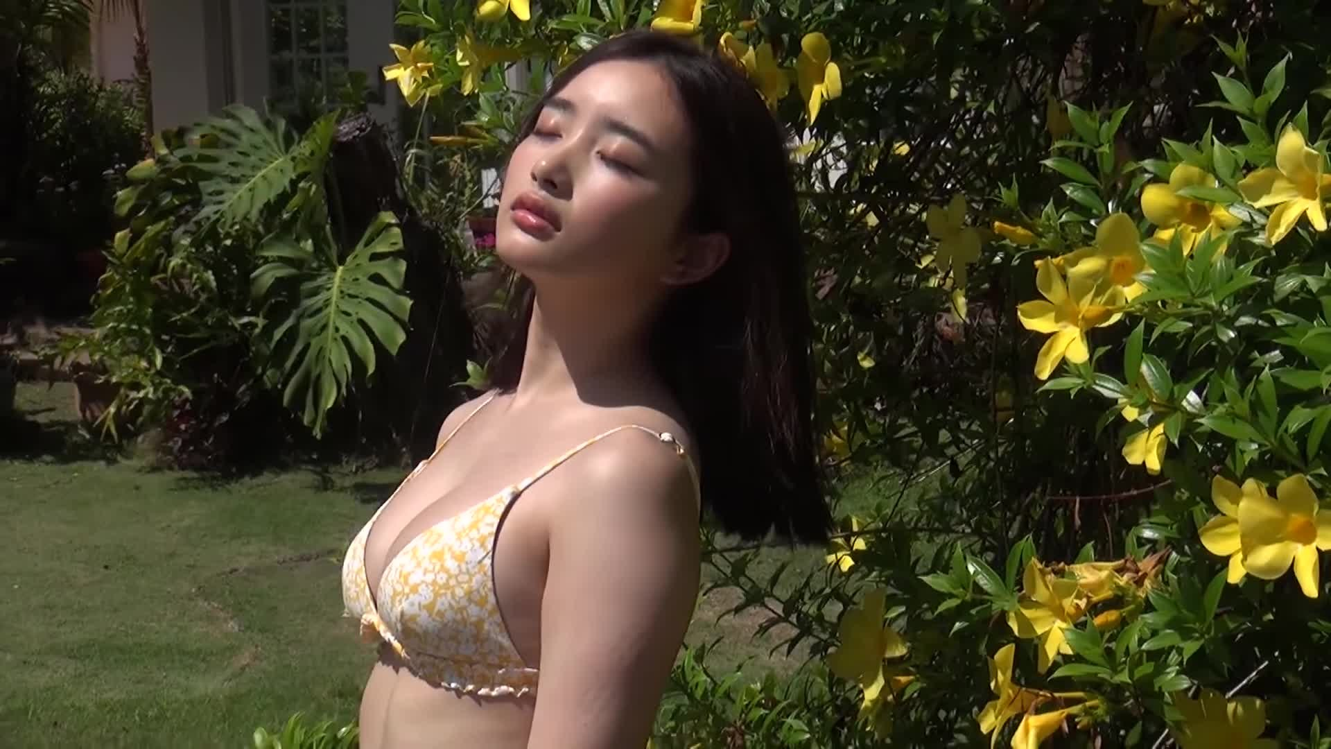 劇団4ドル50セント・安倍乙（講談社ヤンマガch）